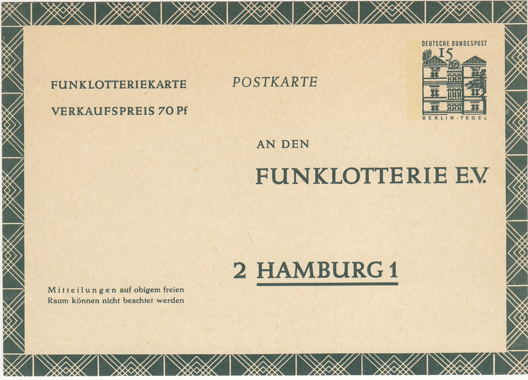 Adressseite einer Funklotterie-Postkarte